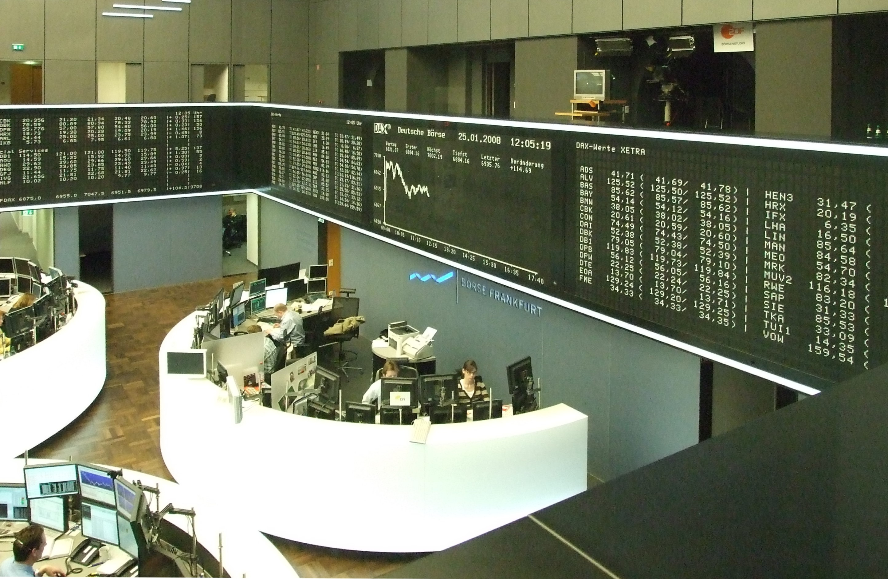 Parkett-Boerse in Ffm